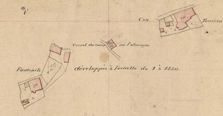 Fontanills (Arles) en el Cadastre napoleònic del 1812 (Arxius Departamentals dels Pirineus Orientals)